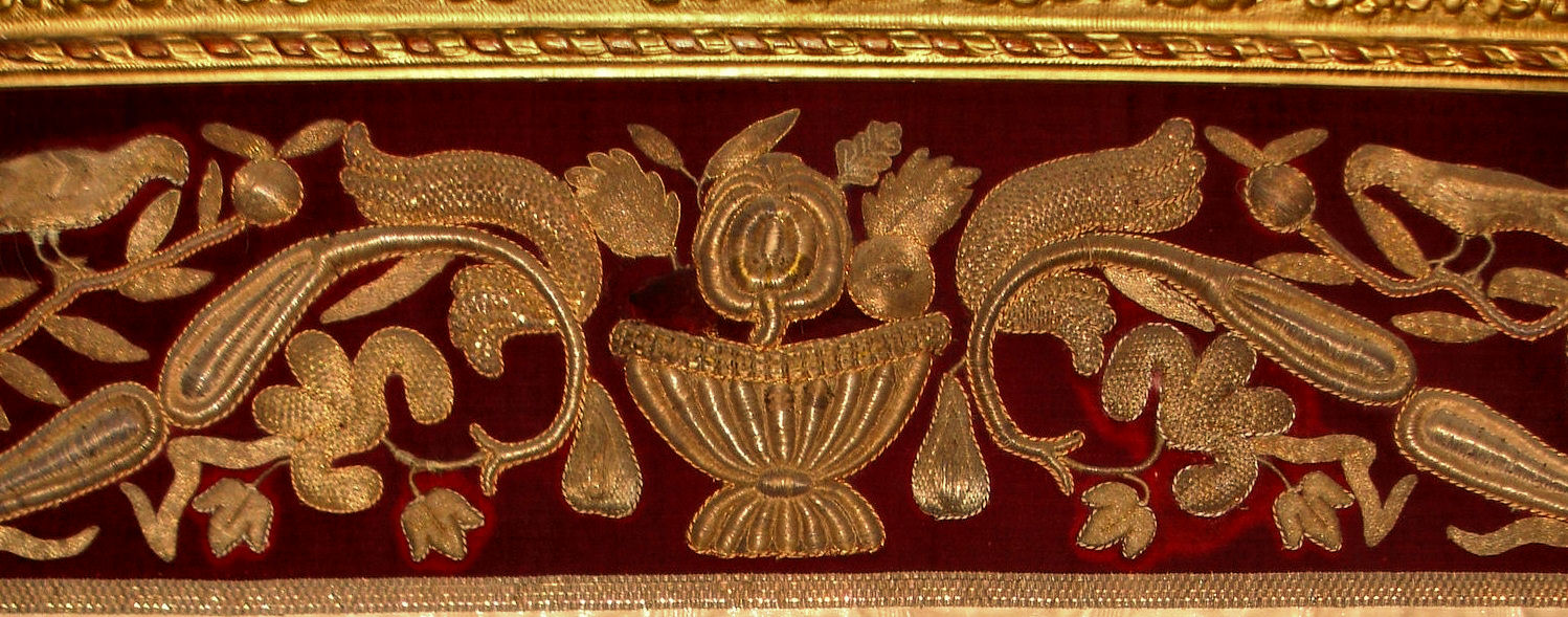 Antependium 1660 Gent,detail